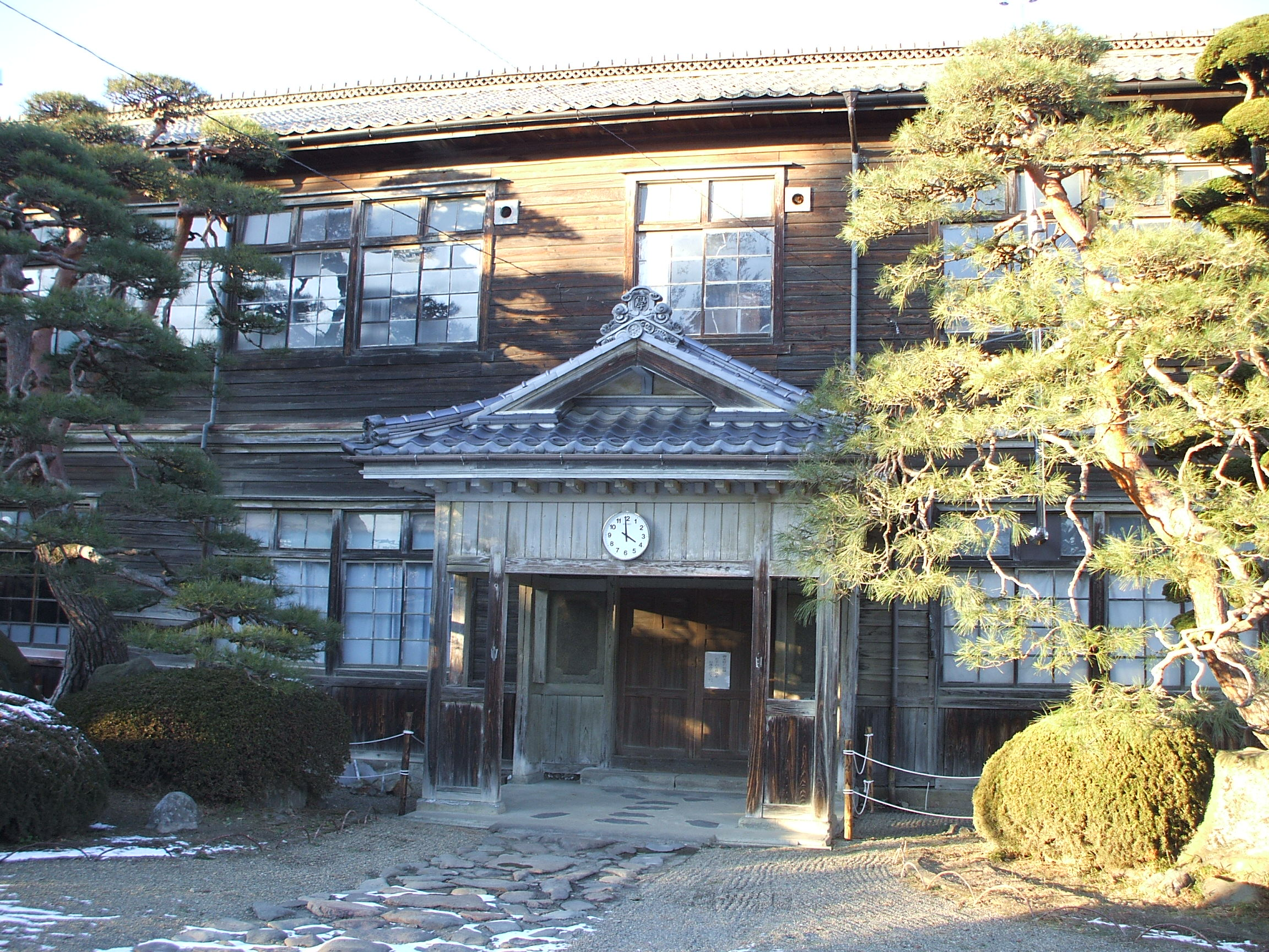 旧管理等昇降口